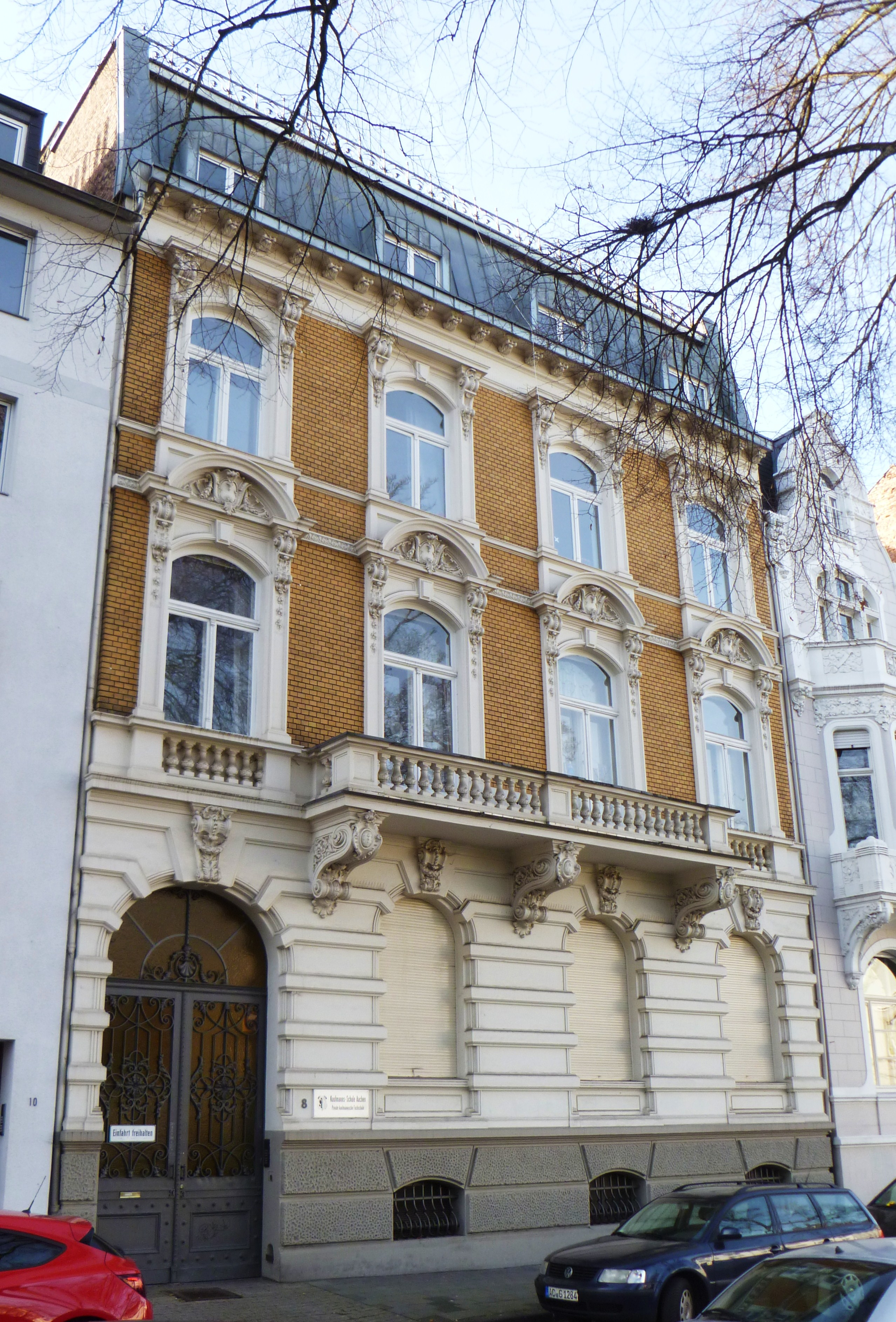 Baudenkmal in Aachen-Frankenberg